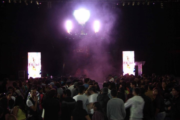 Entrega de los Premios Gold Tie en el año 2010